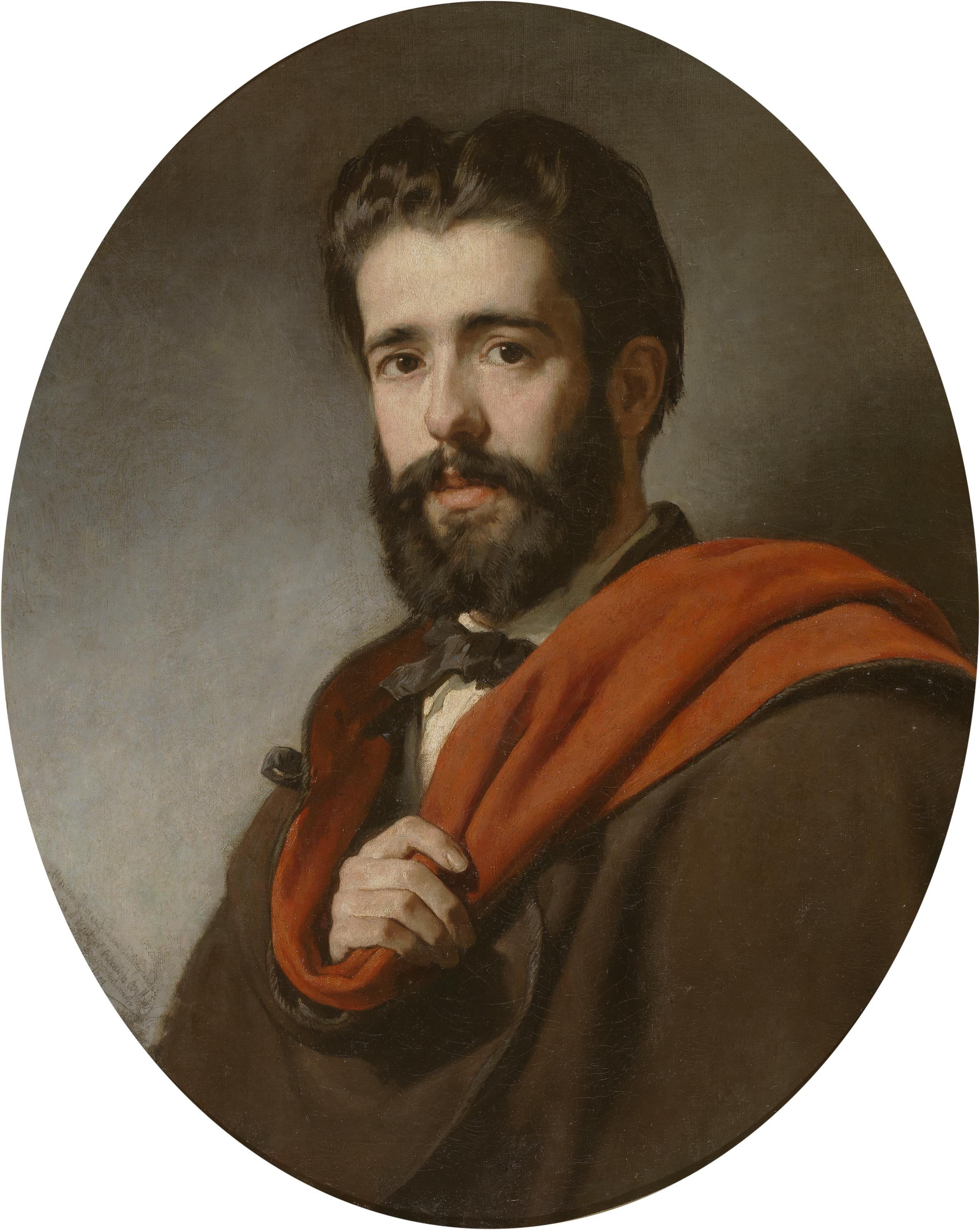 Retrato del escultor español Ricardo Bellver (1845-1924).